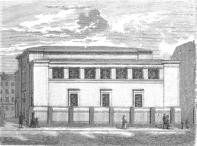 Synagogen i Krystalgade. Opført 1833 af Hetsch i orientalsk Stil.